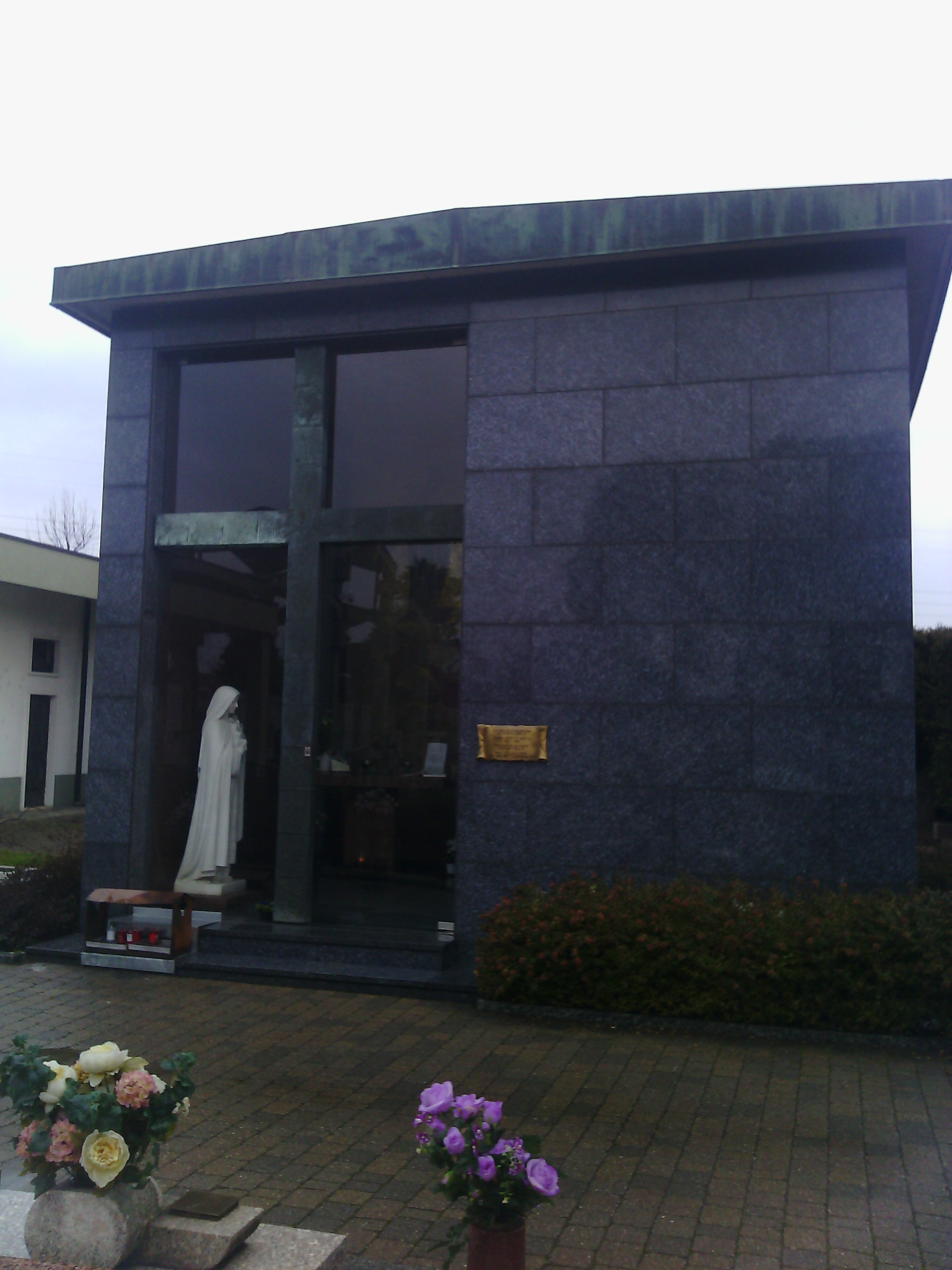 La tomba di Santa Gianna Beretta Molla a Mesero (MI) - Italy